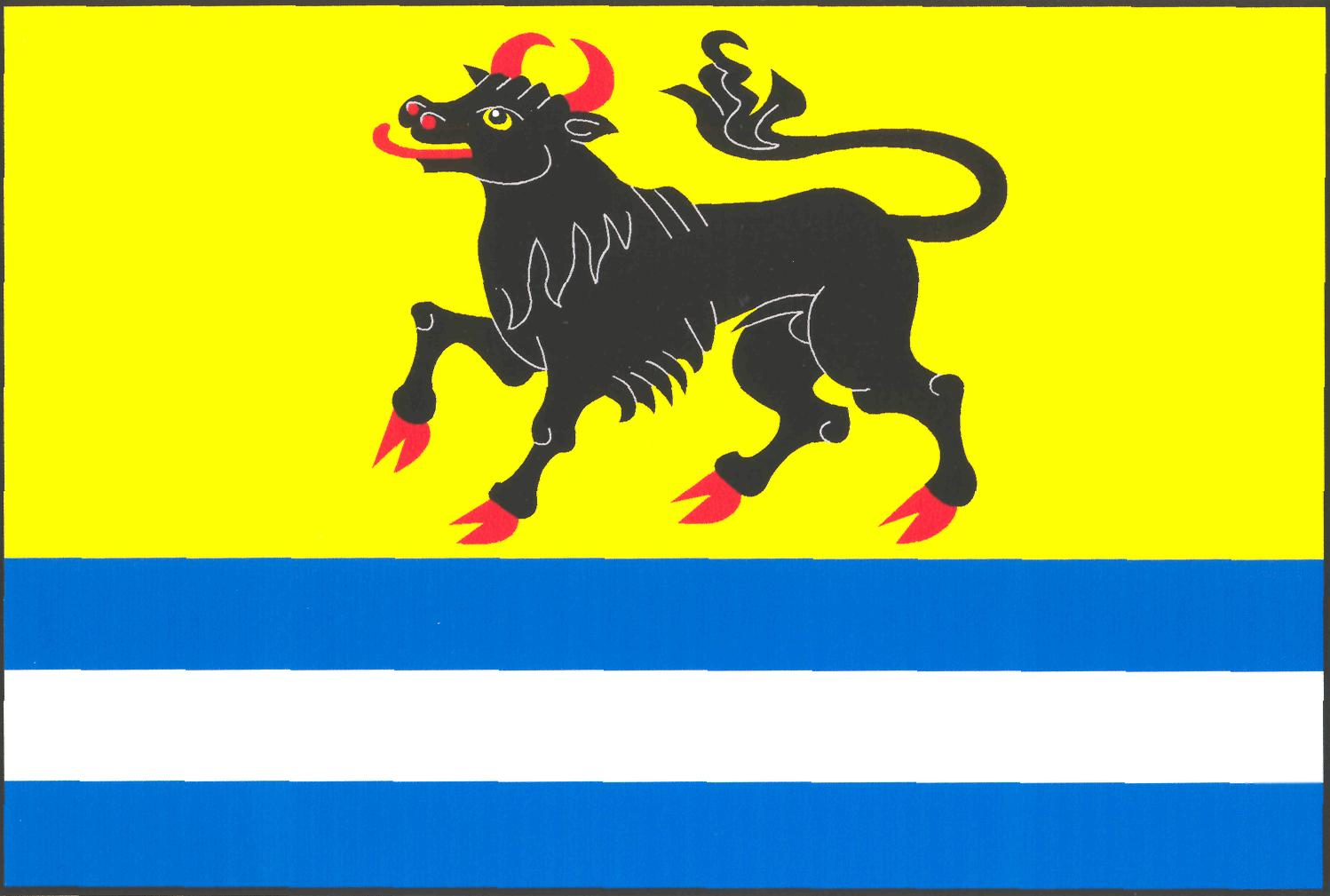 Vlajka obce Měňany